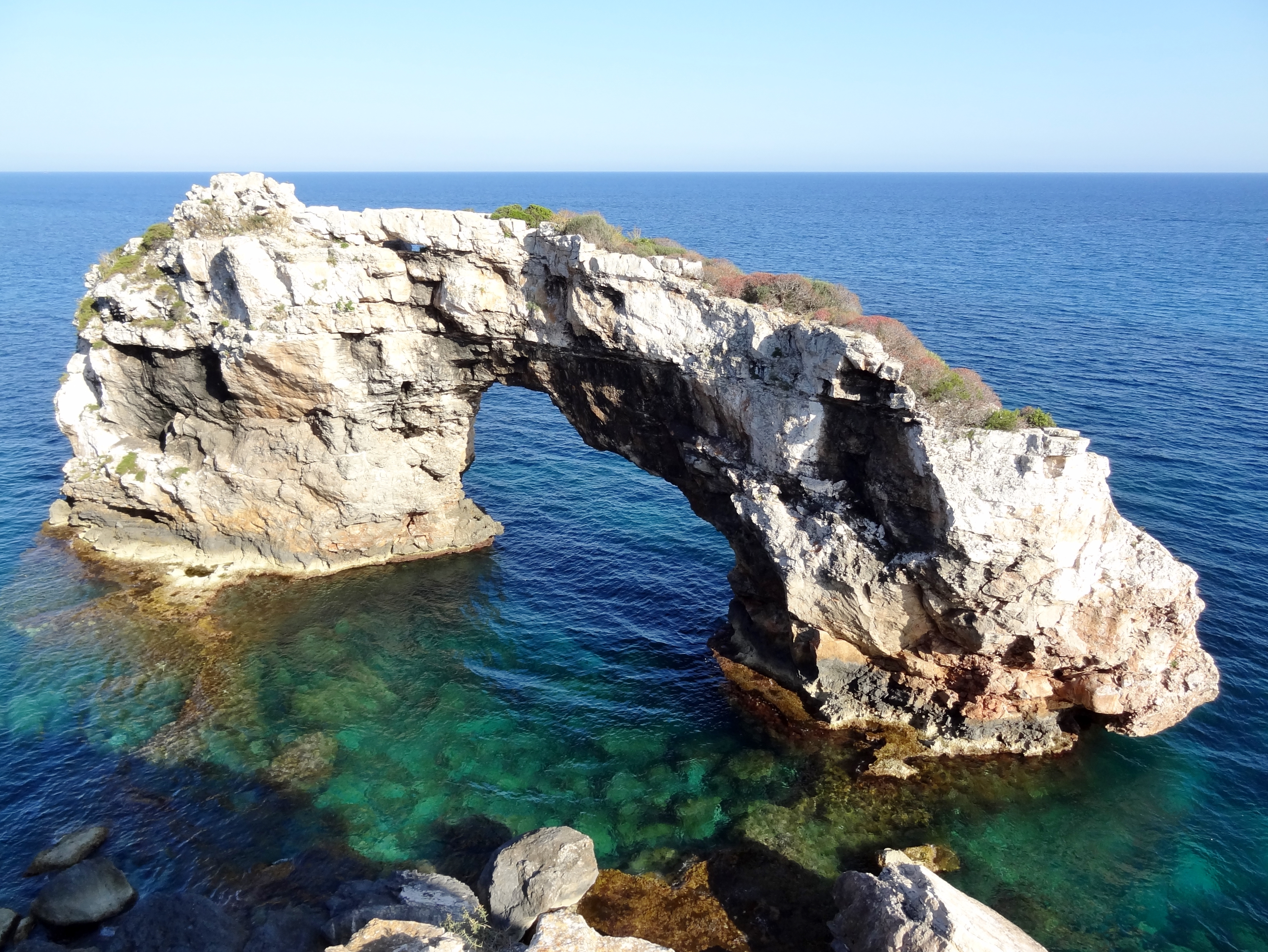 Es Pontàs bei Cala Santanyí in der Gemeinde Santanyí, Mallorca, Spanien